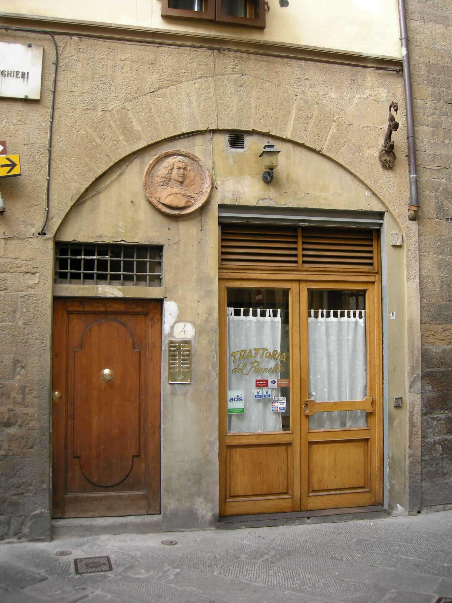 Da pennello